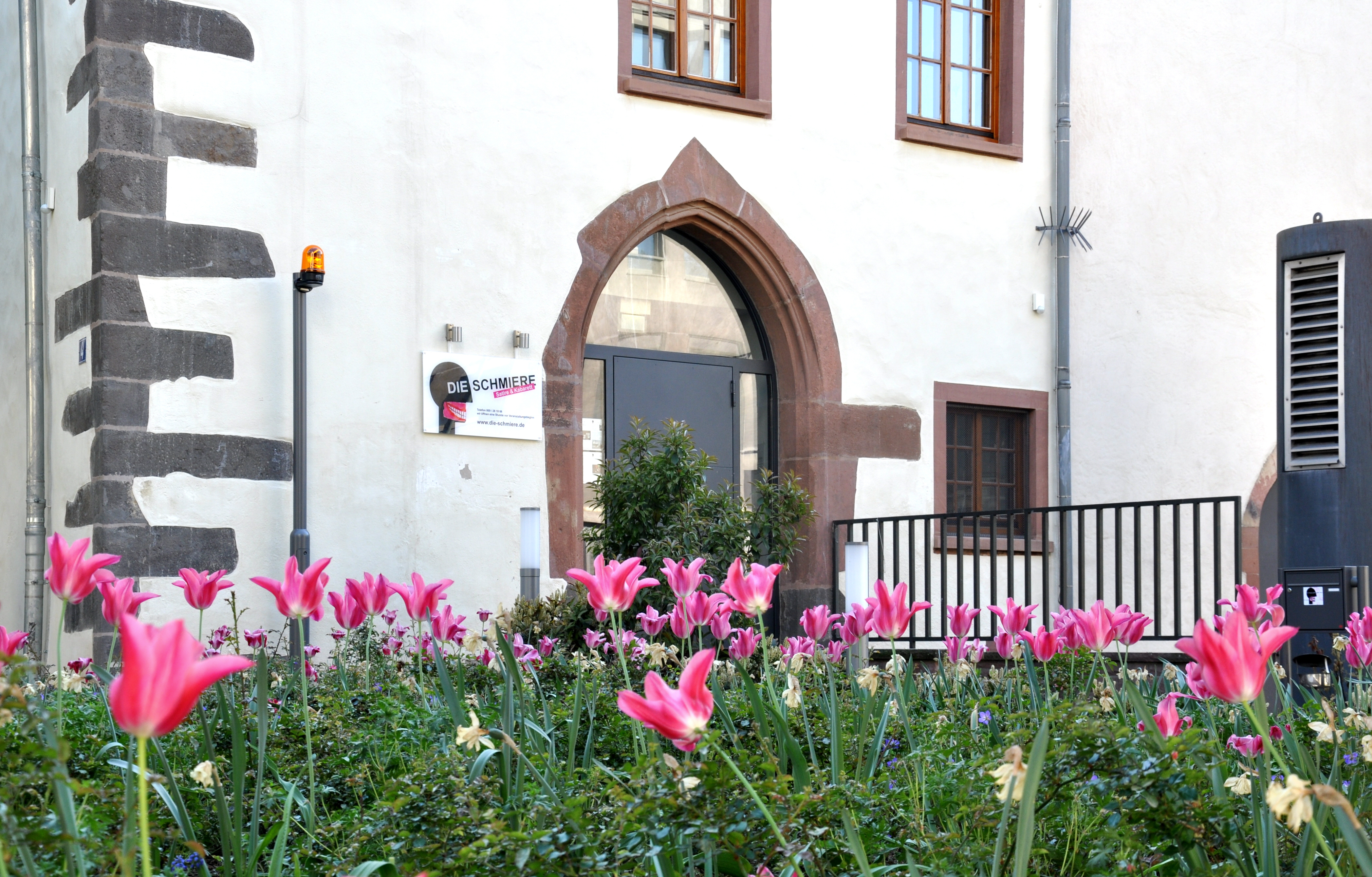 Frankfurt am Main, Kabarett Die Schmiere (im ehemaligen Karmeliterkloster), Eingang